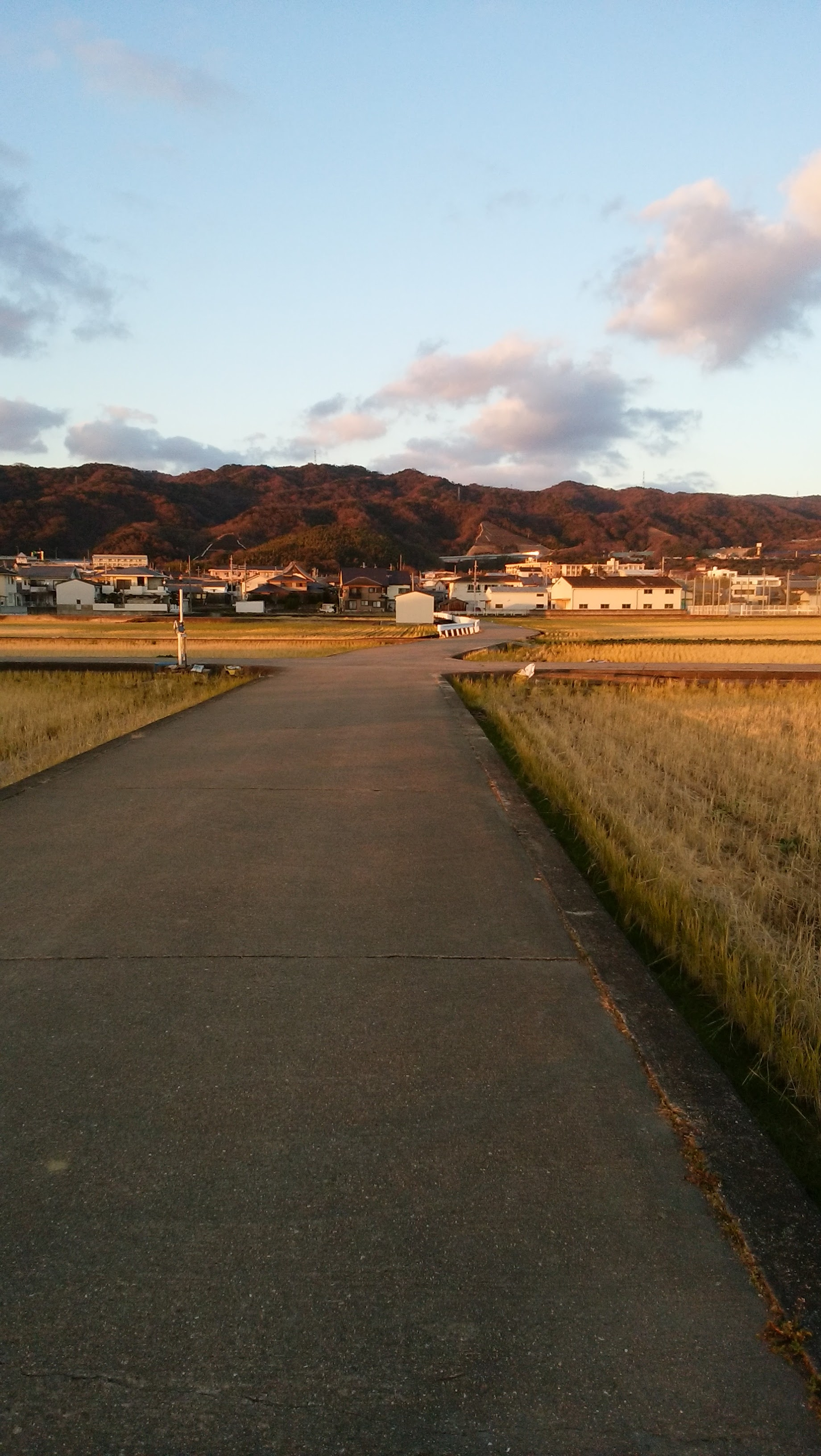 道路